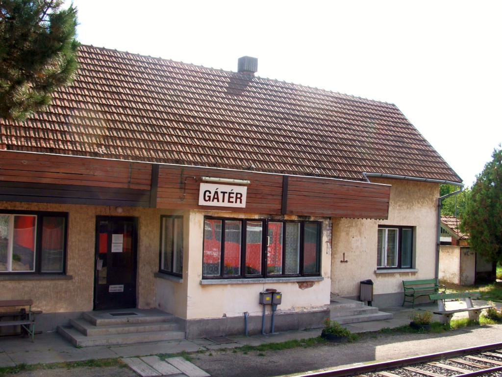 A gátéri vasútállomás